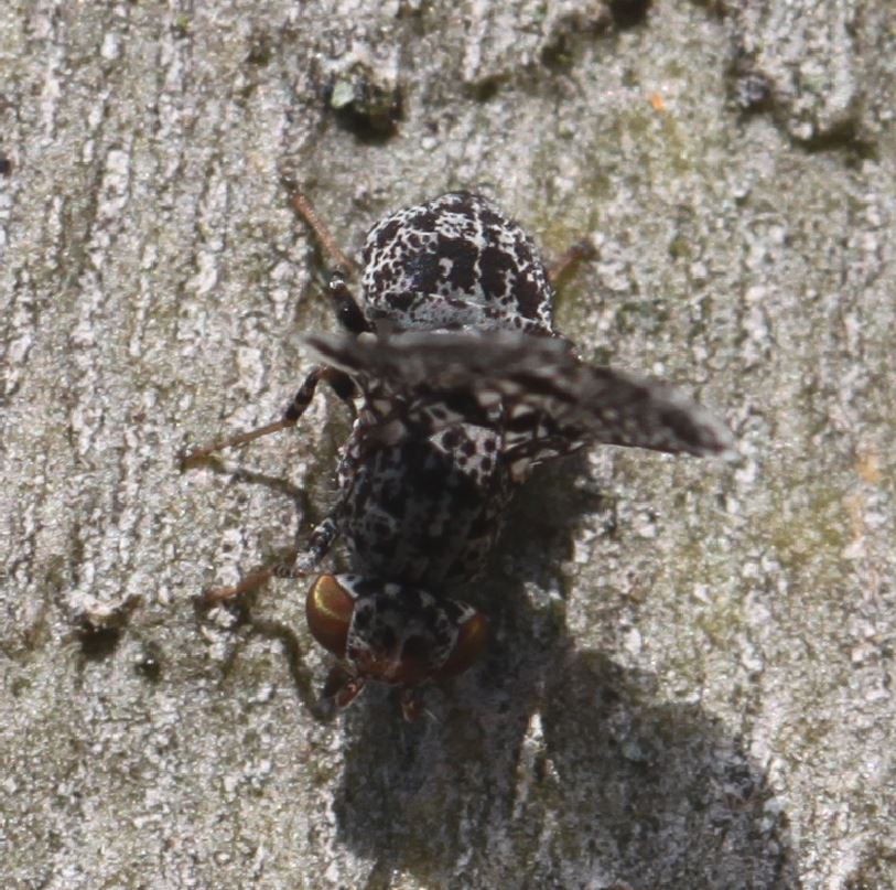 Pfauenfliege (Callopistromyia annulipes) mit aufgerichteten Flügeln am 7. April 2020 in Walldorf/Baden an einer Platane